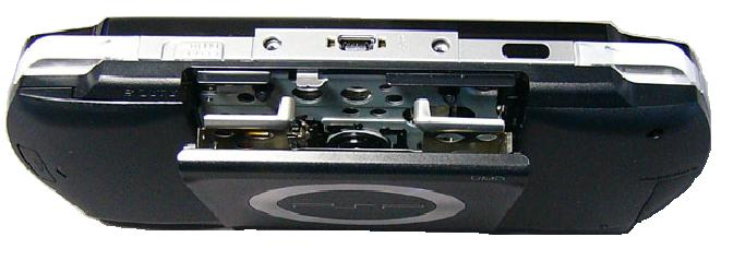 PSP med UMD-luckan öppen